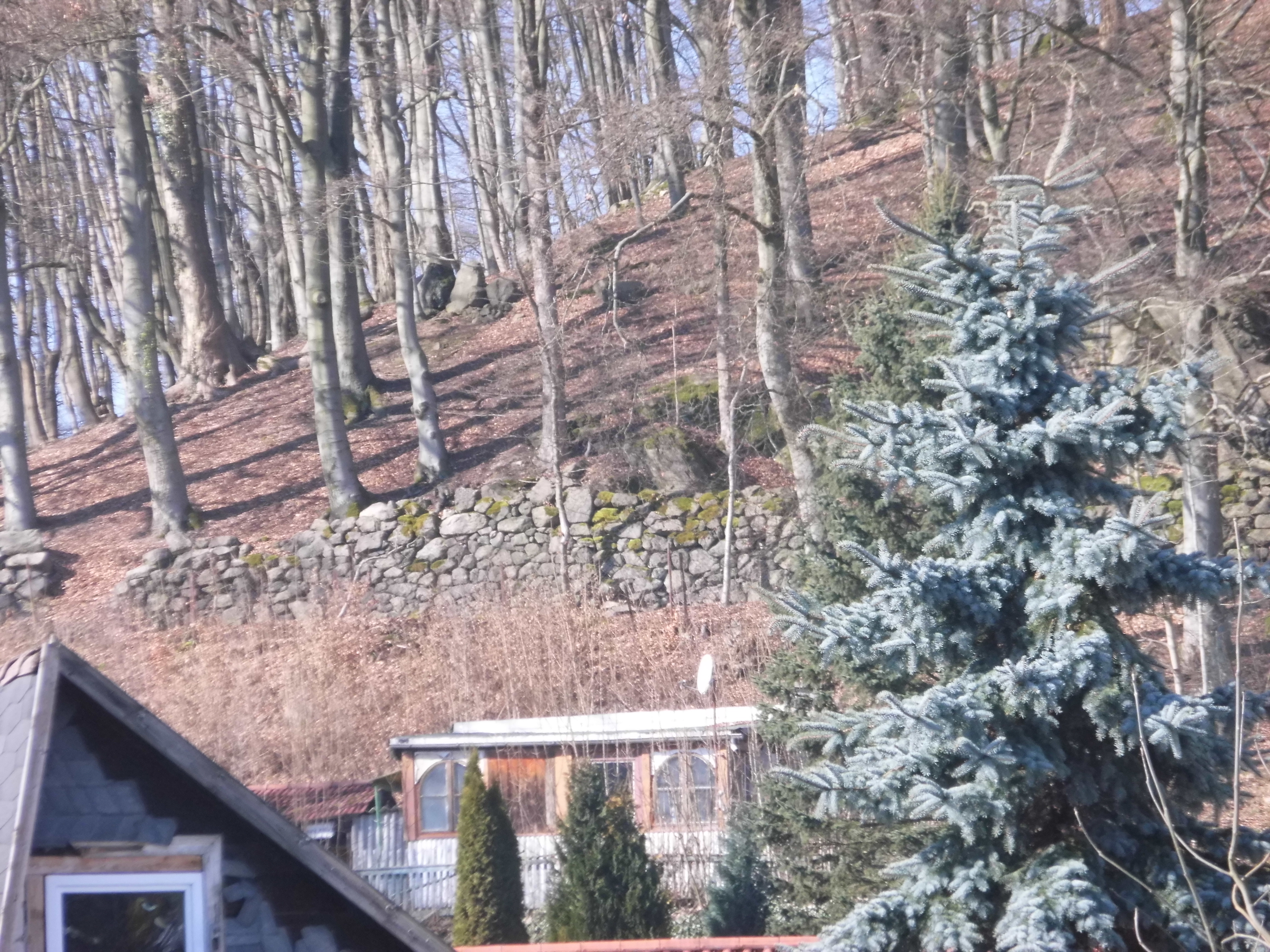 Mögliche Mauerreste von Schloß Ruprechtsburg.